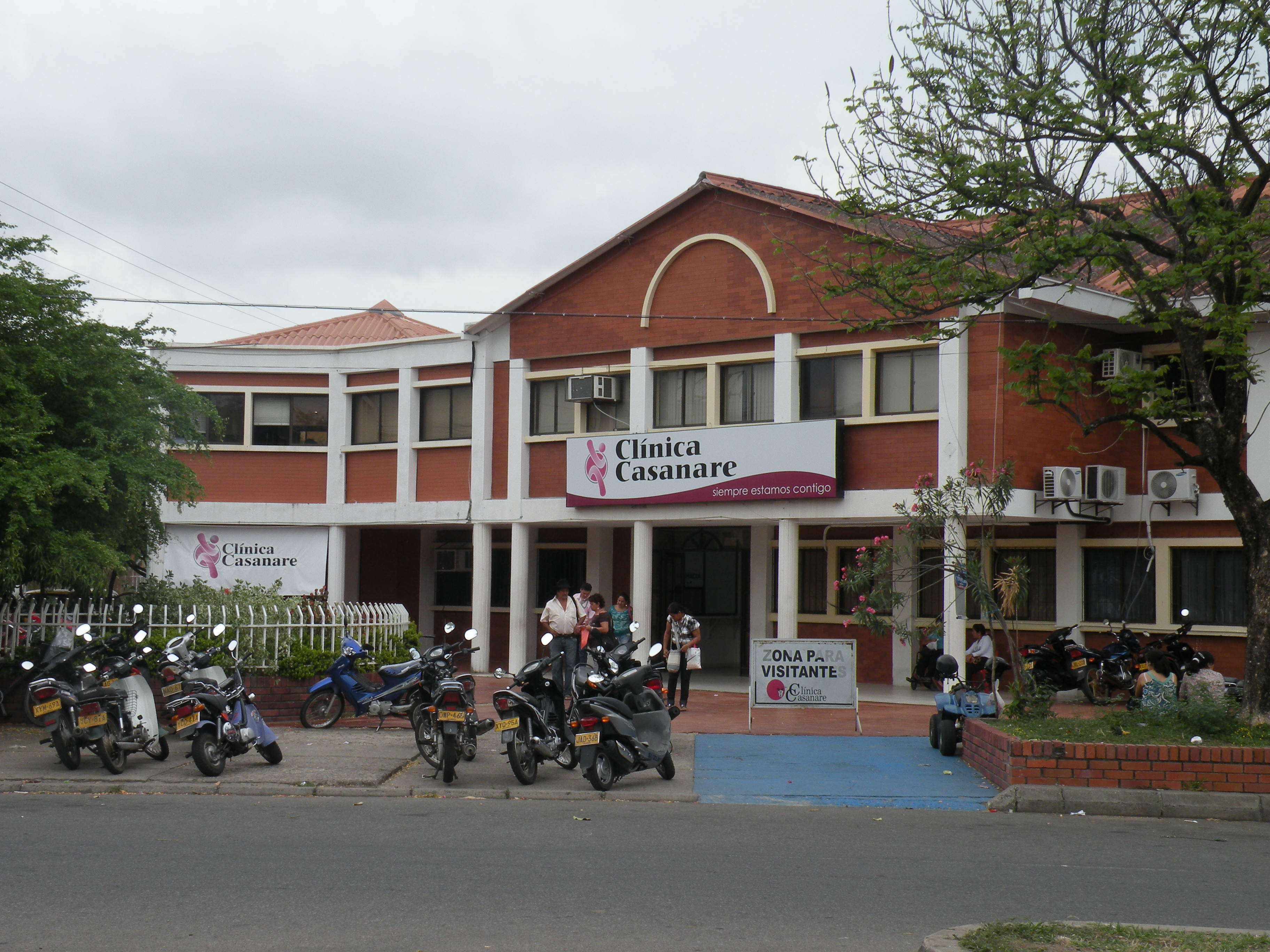 Clinica de Casanare